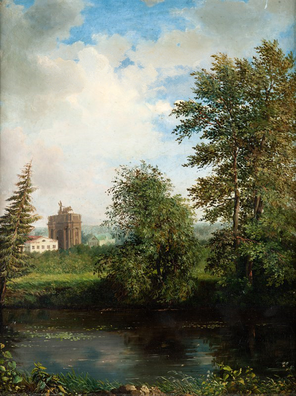 Від на Нарвскія вароты з Екацерынгофскага парка